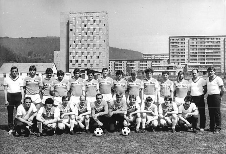 ADN-ZB Schaar 16.6.84 Suhl: Aufsteiger zur Fußball-Oberliga 1984-85: BSG Motor Suhl. Einen Spieltag vor Abschluß der Aufstiegsrunde sicherte sich die BSG Motor Suhl einen der beiden freien Plätze in der Fußball-Oberliga. Die Thüringer spielen damit in der nächsten Serie erstmals in der höchsten DDR-Fußballklasse. Hintere Reihe v.l.n.r.: Trainer Paul Kersten, Wolfgang Reuter, Peter Staps, Hartmut Weiß, Andreas Böhm, Roman Seyfarth, Andreas Schneider, Dieter Kurth, Klaus Schröder, Matthias Brückner, Erhard Mosert, Gerd Schellhase, Mannschaftsleiter Frank Hoffmann und Trainer Ernst Kurth. Vordere Reihe v.l.n.r.: Masseur Peter Eichelbrenner, Klaus Semineth, Dieter Erhardt, Jürgen Schneider, Torhüter Walter Jänicke, Torhüter Klaus Müller, Ralf Eismann, Uwe Jertschewski, Uwe Trömel und Trainer Burkhardt Winkler.